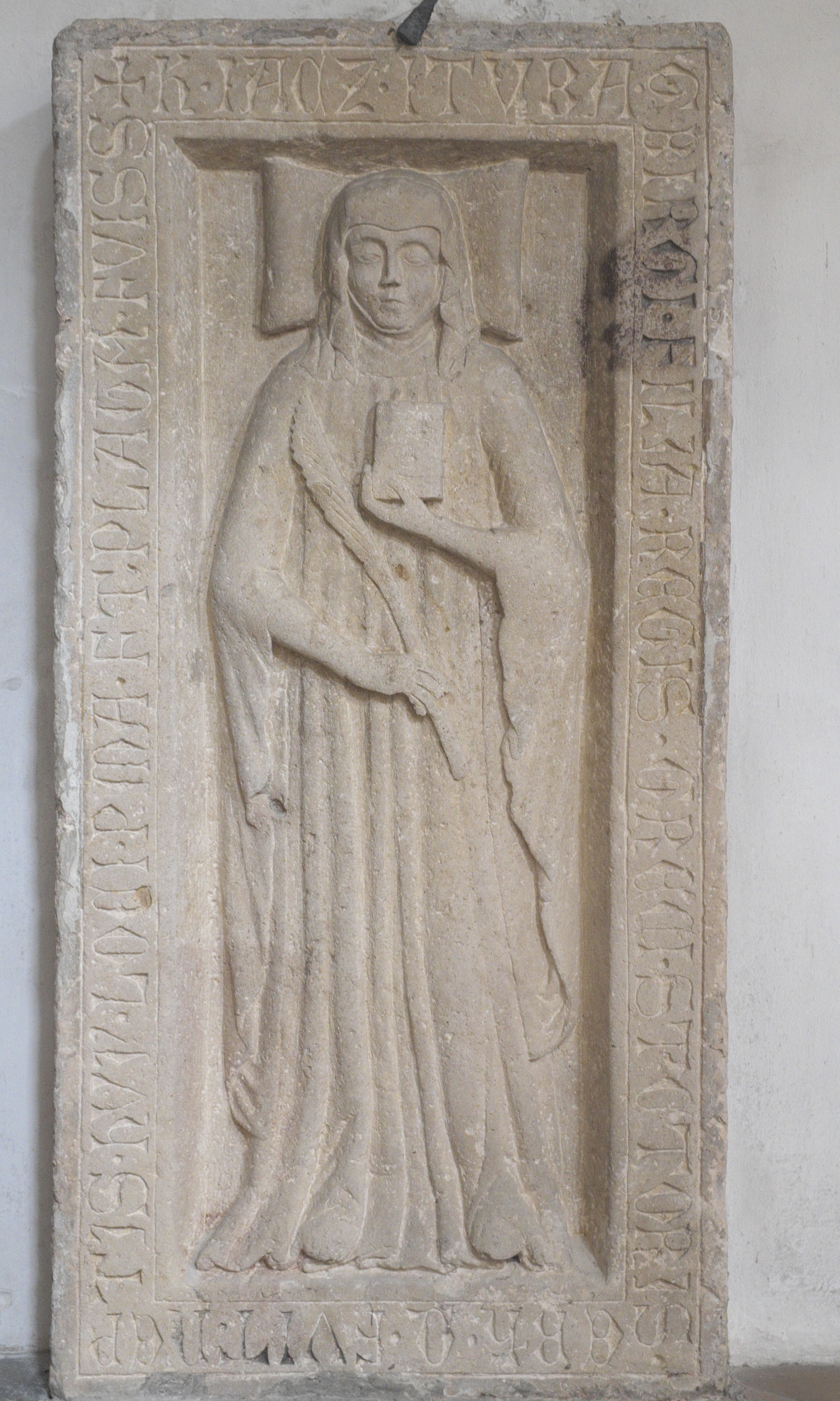 Katholische Pfarrkirche St. Emmeram, ehemalige Benediktinerinnen-Klosterkirche Mariä Himmelfahrt, in Geisenfeld im Landkreis Pfaffenhofen an der Ilm (Bayern/Deutschland), Tumbadeckplatte der ersten Äbtissin Gerbirgis aus dem 14. Jahrhundert